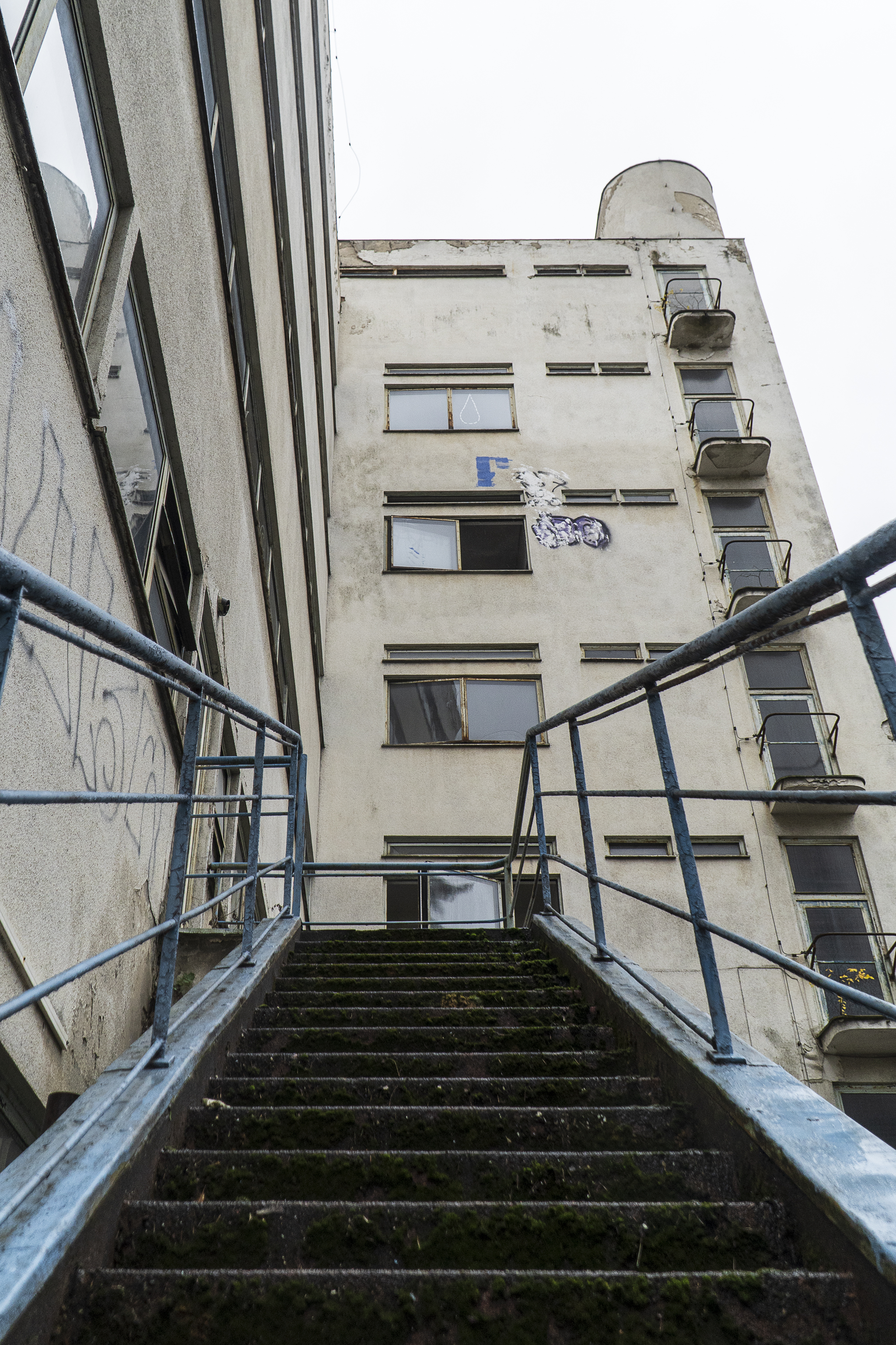 Liečebný dom Machnáč v Trenčianskych Tepliciach